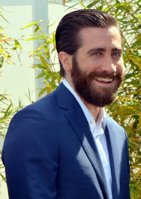 Jake Gyllenhaal au festival de Cannes